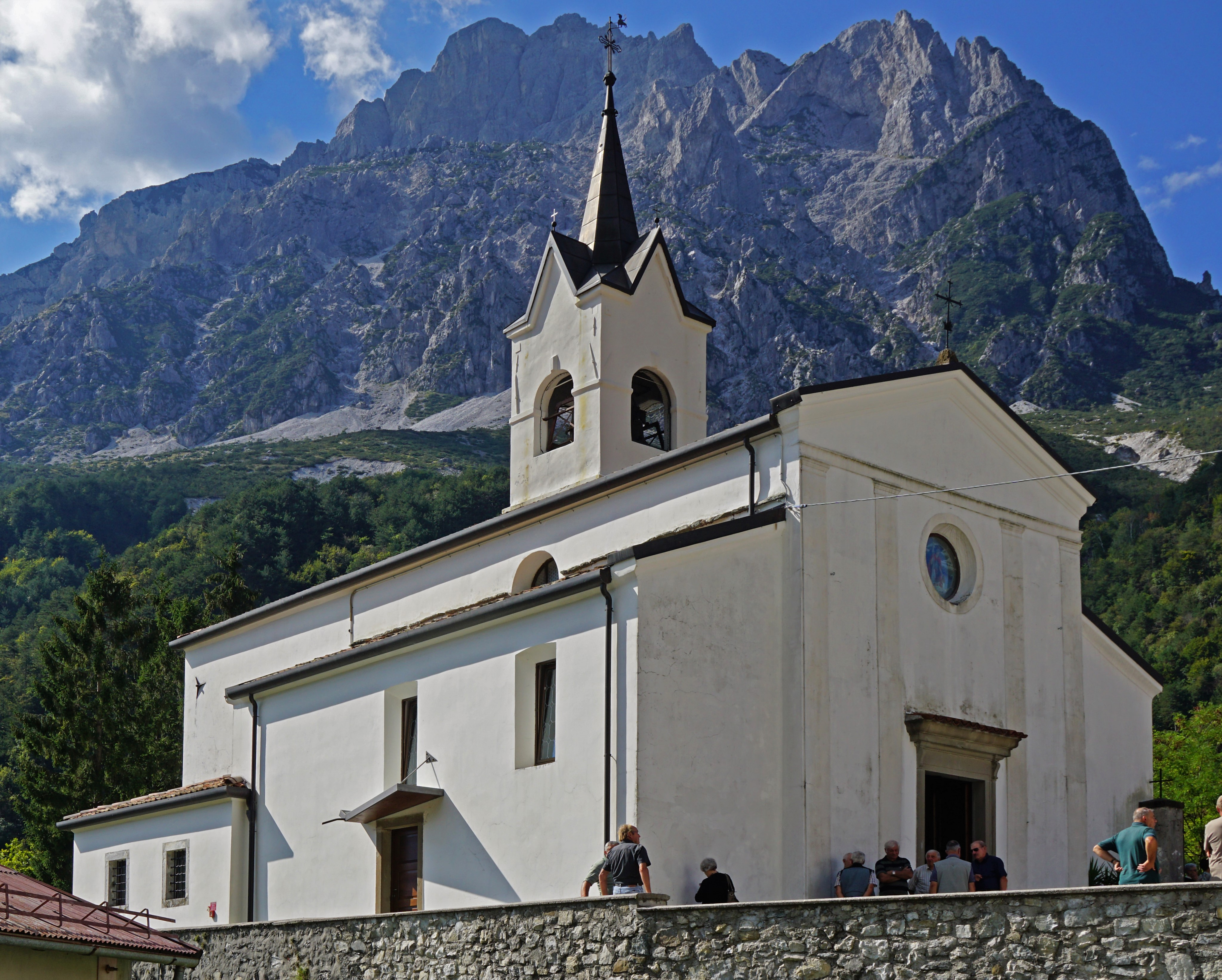 Pfarrkirche San Floriano, Dordolla (Moggio Udinese, Italien)